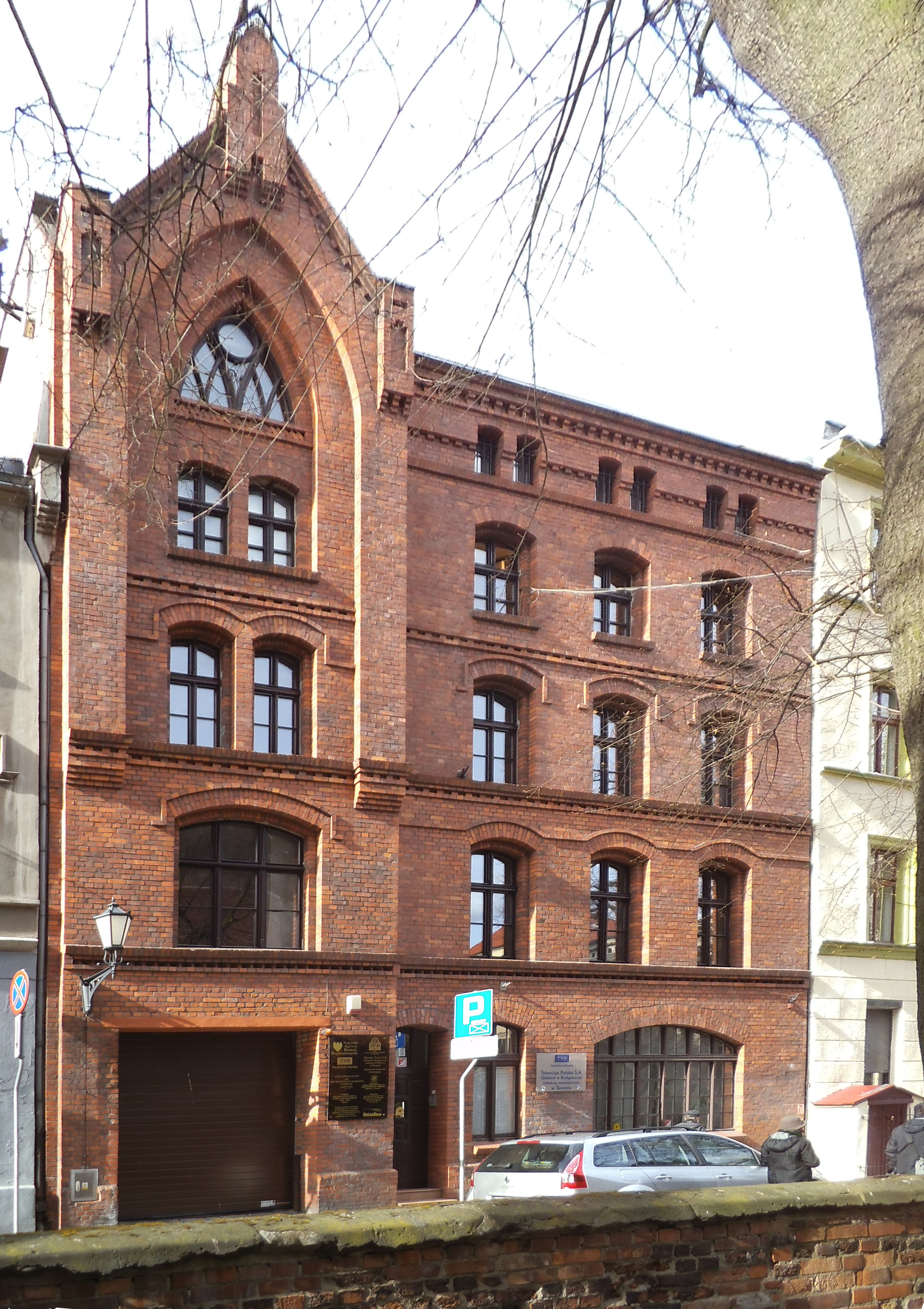 Toruńska Agencja Rozwoju Regionalnego SA